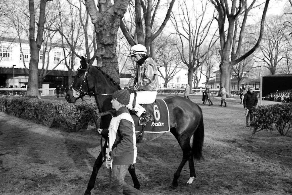 Bauyrzhan Murzabayev im Dezember 2019 auf der Galopprennbahn Dortmund-Wambel vom Führring auf dem Weg zum Aufgalopp.